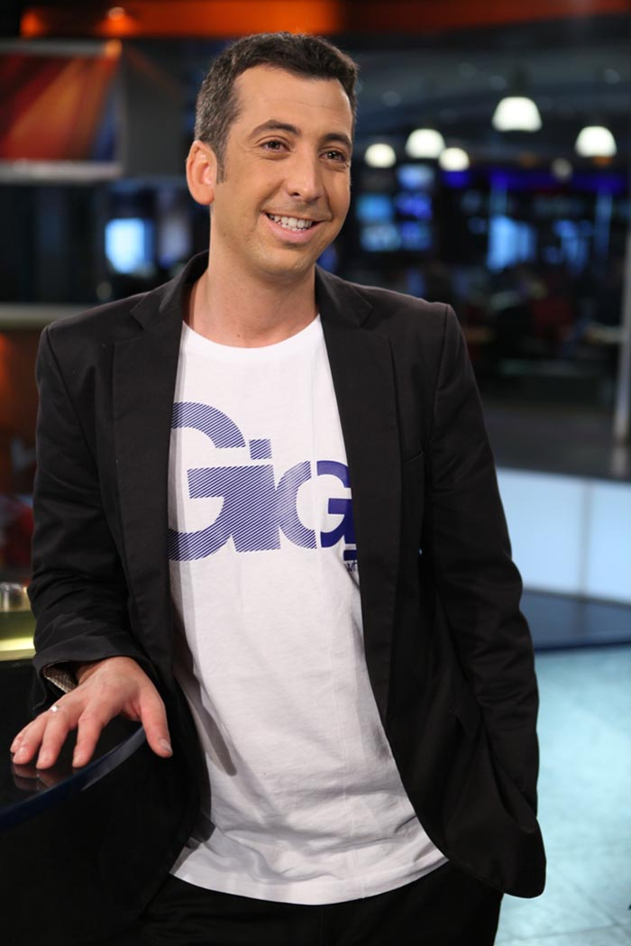 he:גיא לרר